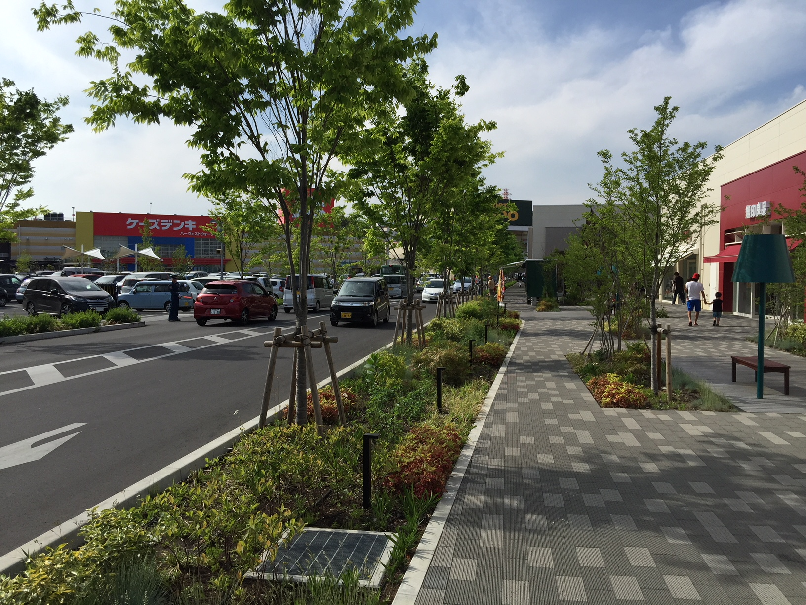 おやまゆうえんハーヴェストウォーク